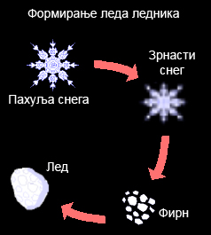 Формирање леда ледника